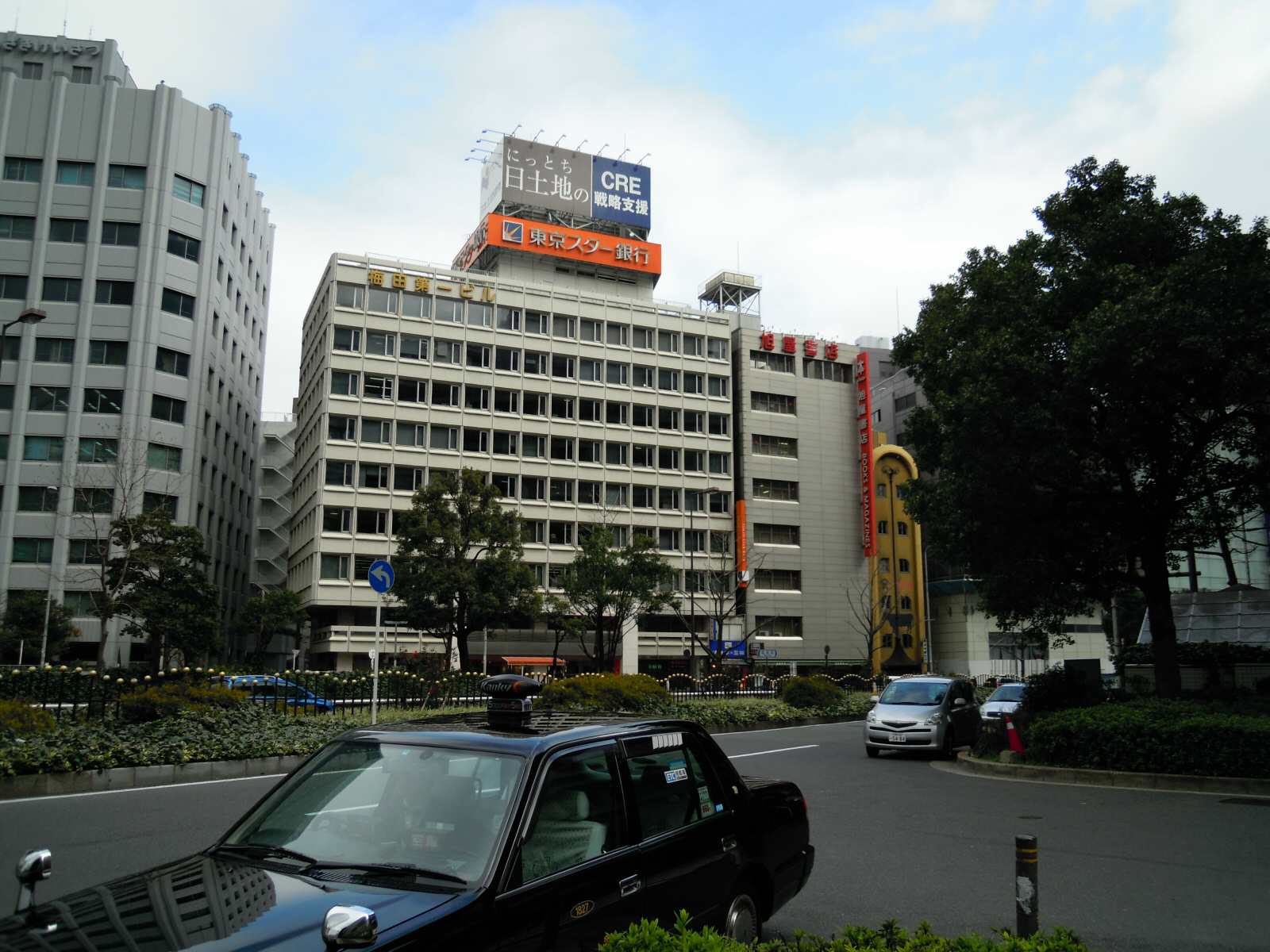 Books Asahiya, Umeda